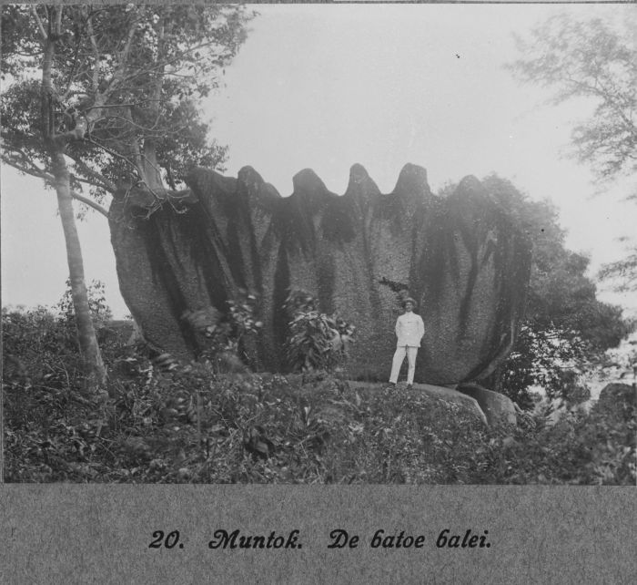 Seorang Belanda berpose di dekat Batu Balei, Muntok, Pulau Bangka